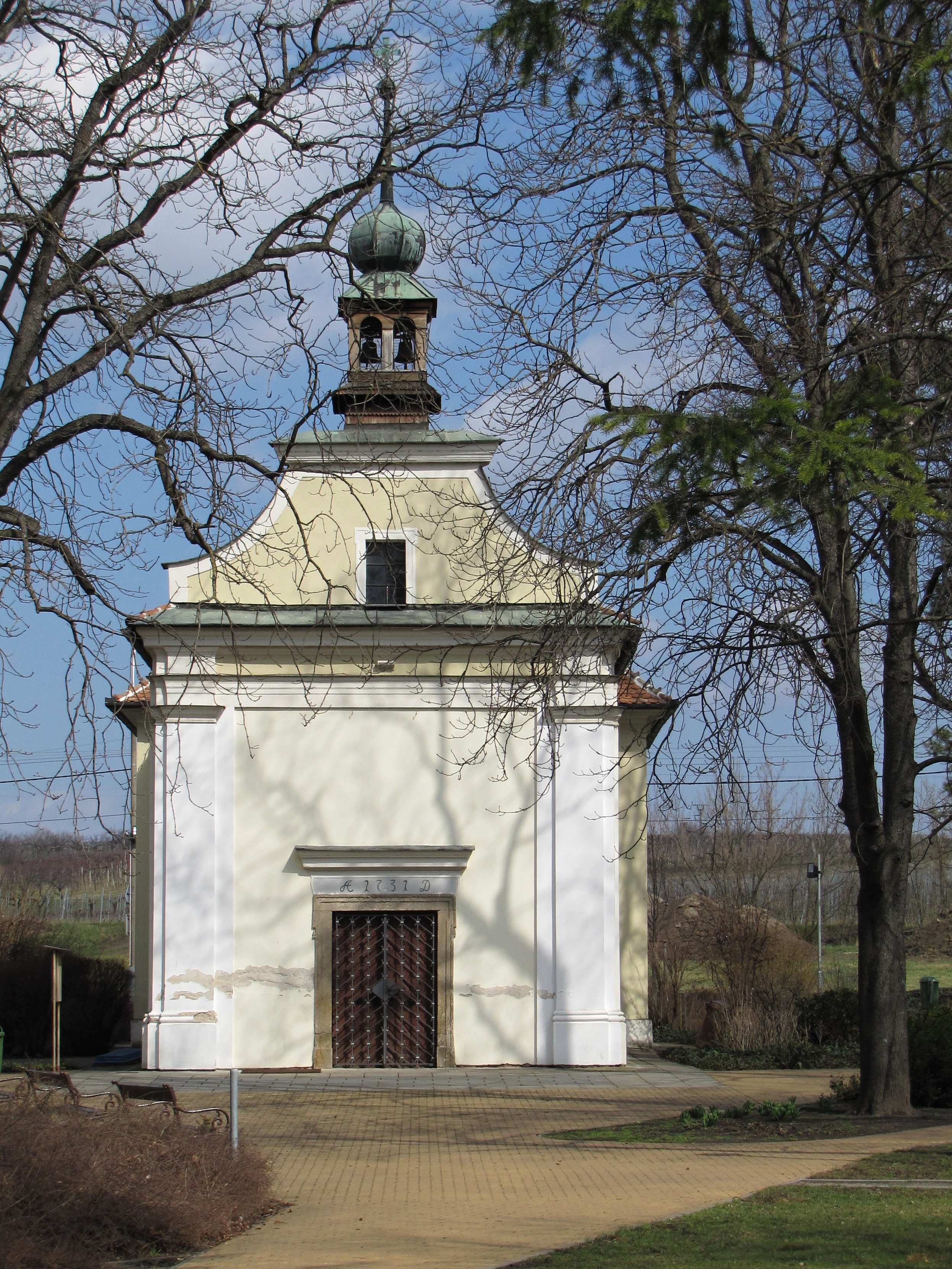 Kaple svatého Vendelína v Čejči